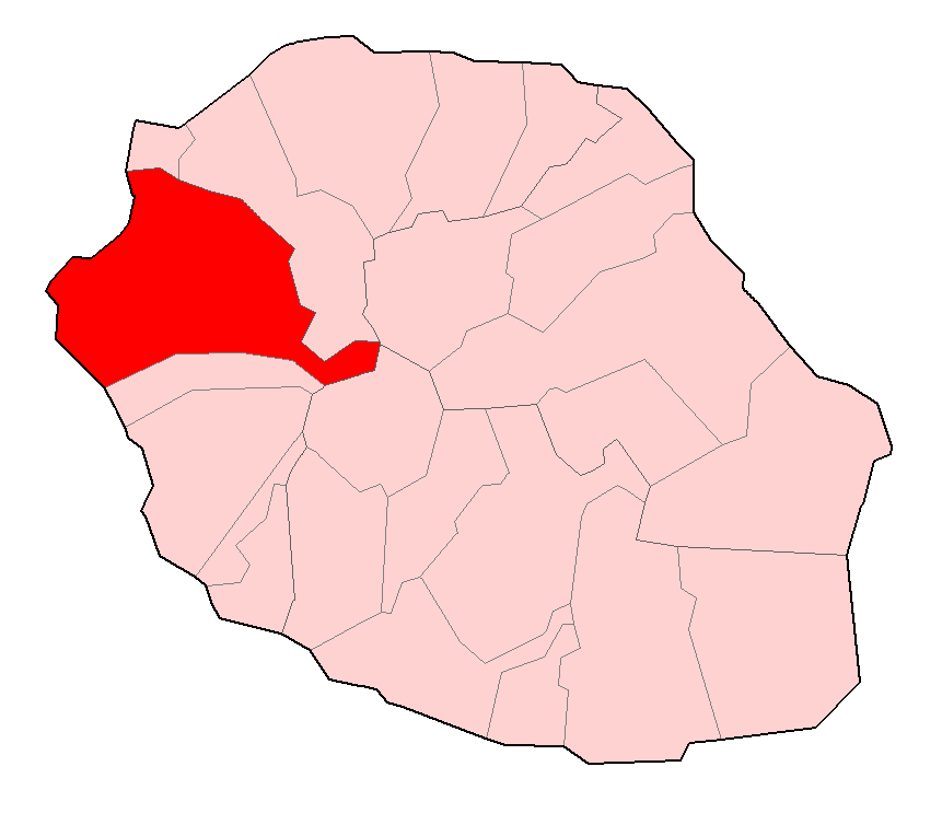 Carte de la Réunion permettant de localiser Saint-Paul.